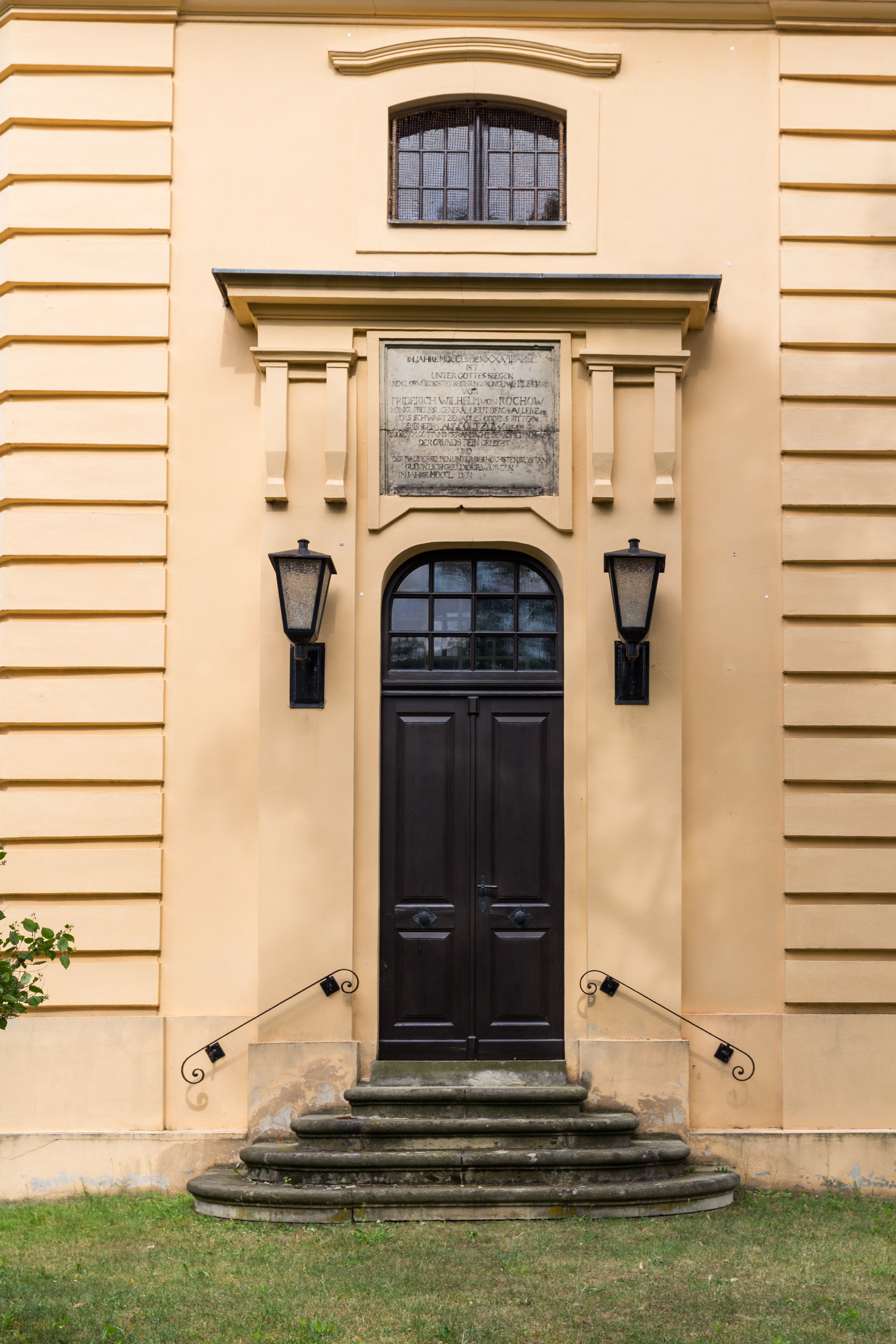 Dorfkirche Golzow, Landkreis Potsdam-Mittelmark, Brandenburg